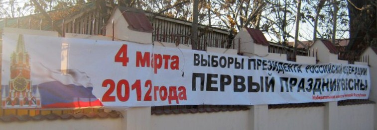 Баннер, информирормирующий население о предстоящих выборах Президента России